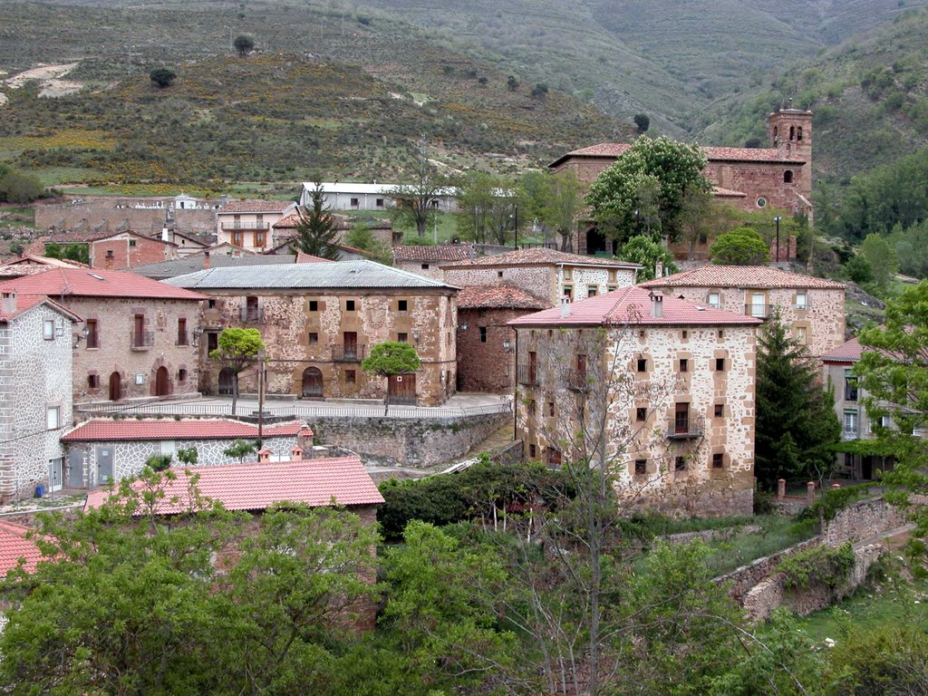 Ventrosa, municipio de La Rioja (España)